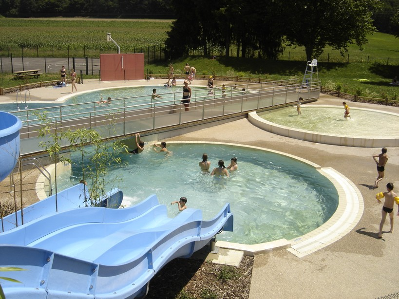 Centre Nautique intercommunal de la Linotte